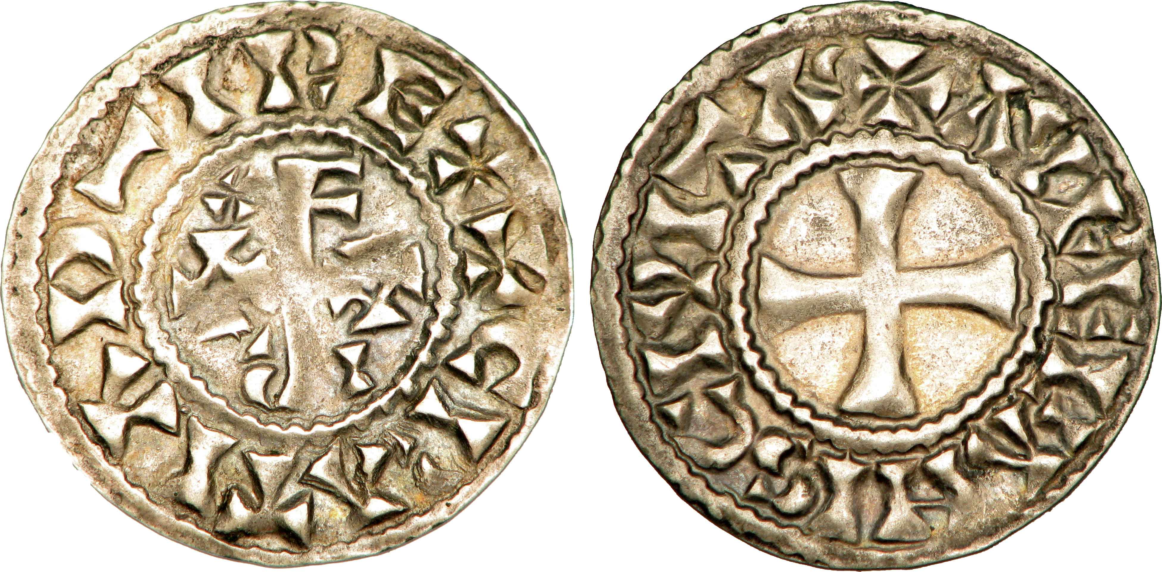 Nom de l'atelier/ville : Orléans Métal : argent Diamètre : 20 mm Axe des coins : 3 h. Poids : 1,31 g. Titulature avers : + CRATIA D-I REX, (légende commençant à 9 heures). Description avers : Monogramme de type carolin (KAROLFVS). Traduction avers : (Charles, roi par la grâce de Dieu). Titulature revers : + AVRELIANIS CIVITA. Description revers : Croix. Traduction revers : (Cité d'Orléans)